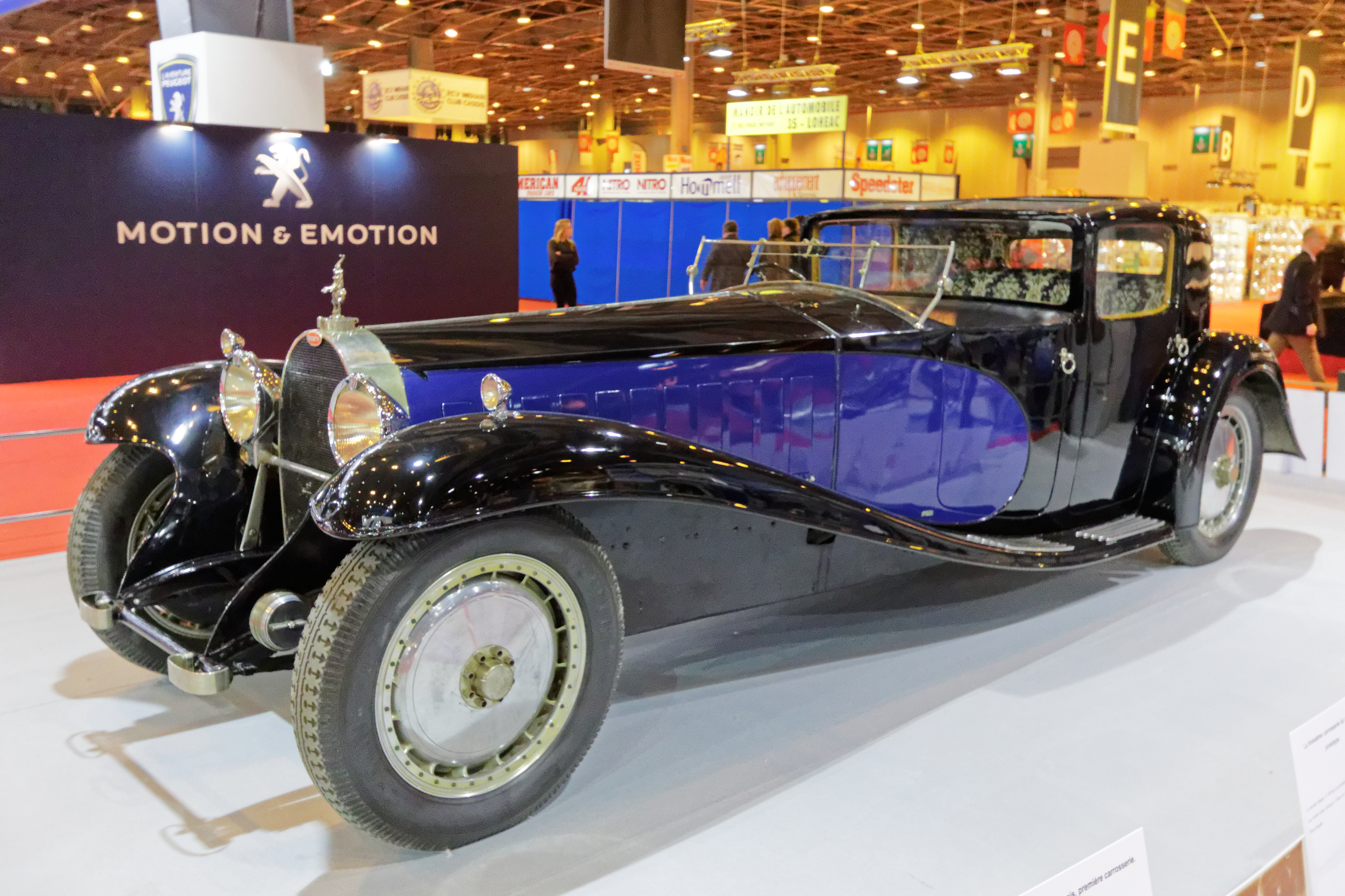 Une des voiture présentée lors du salon Rétromobile de Paris 2015